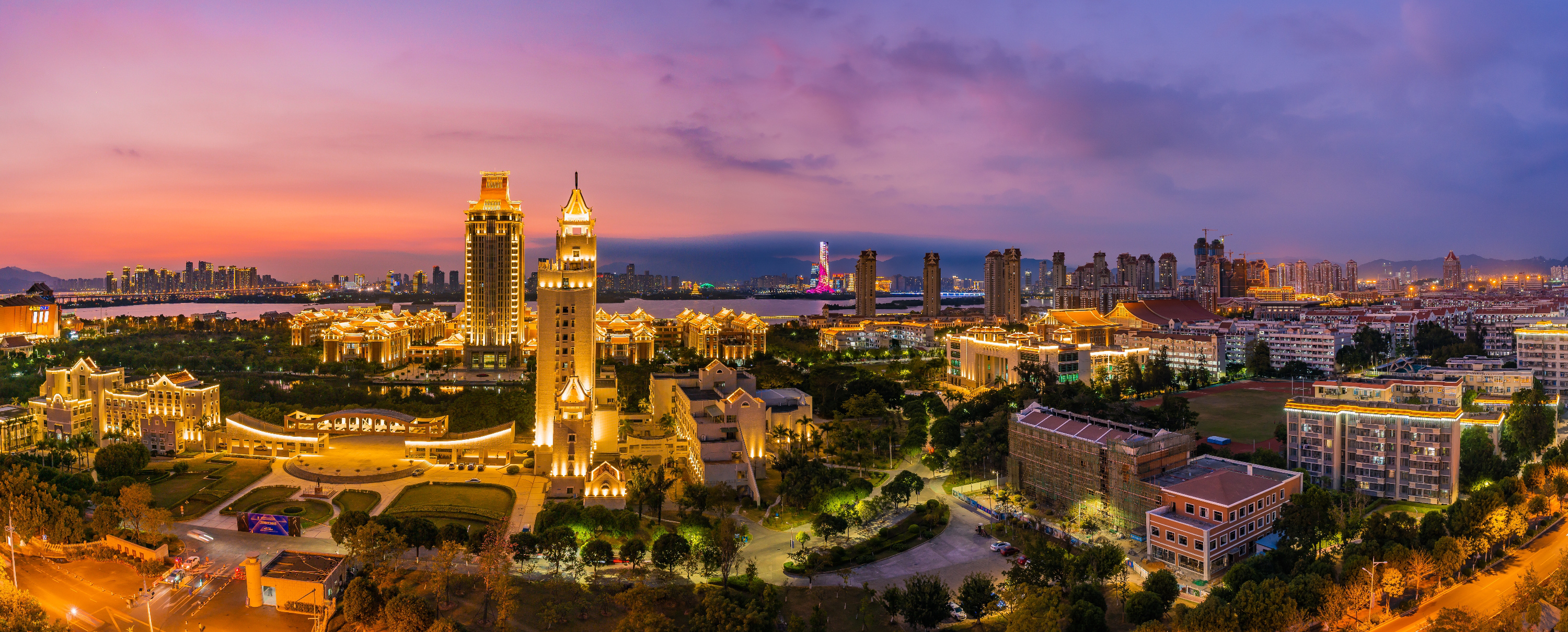 集美大学夜间全景